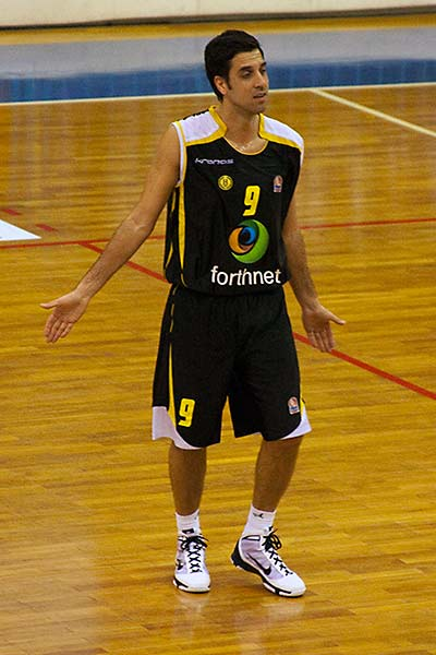 Νίκος Χατζής, Έλληνας καλαθοσφαιριστής